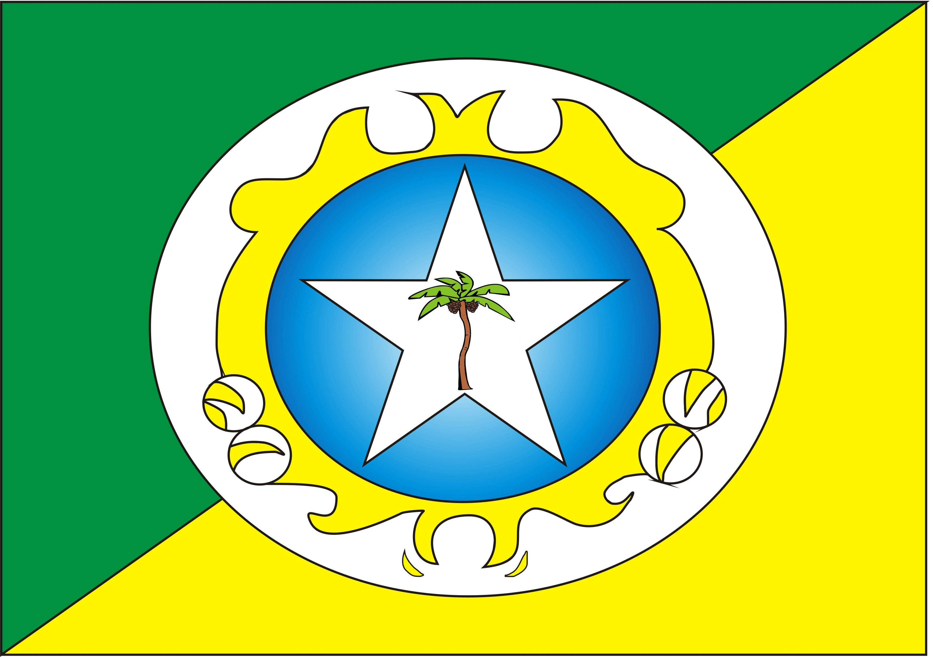 Bandeira do MUncipio de Cajari-Ma